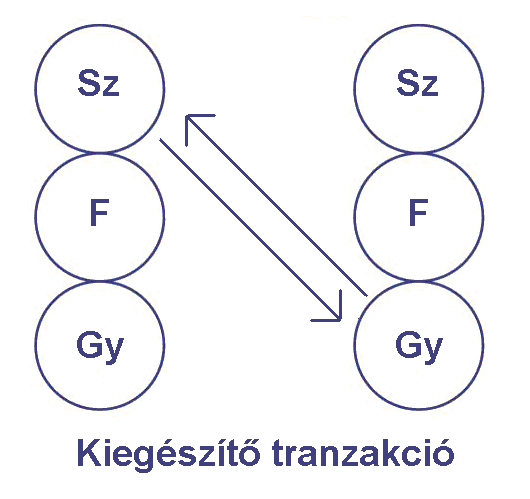 Kiegészítő tranzakció a játszmaelméletben